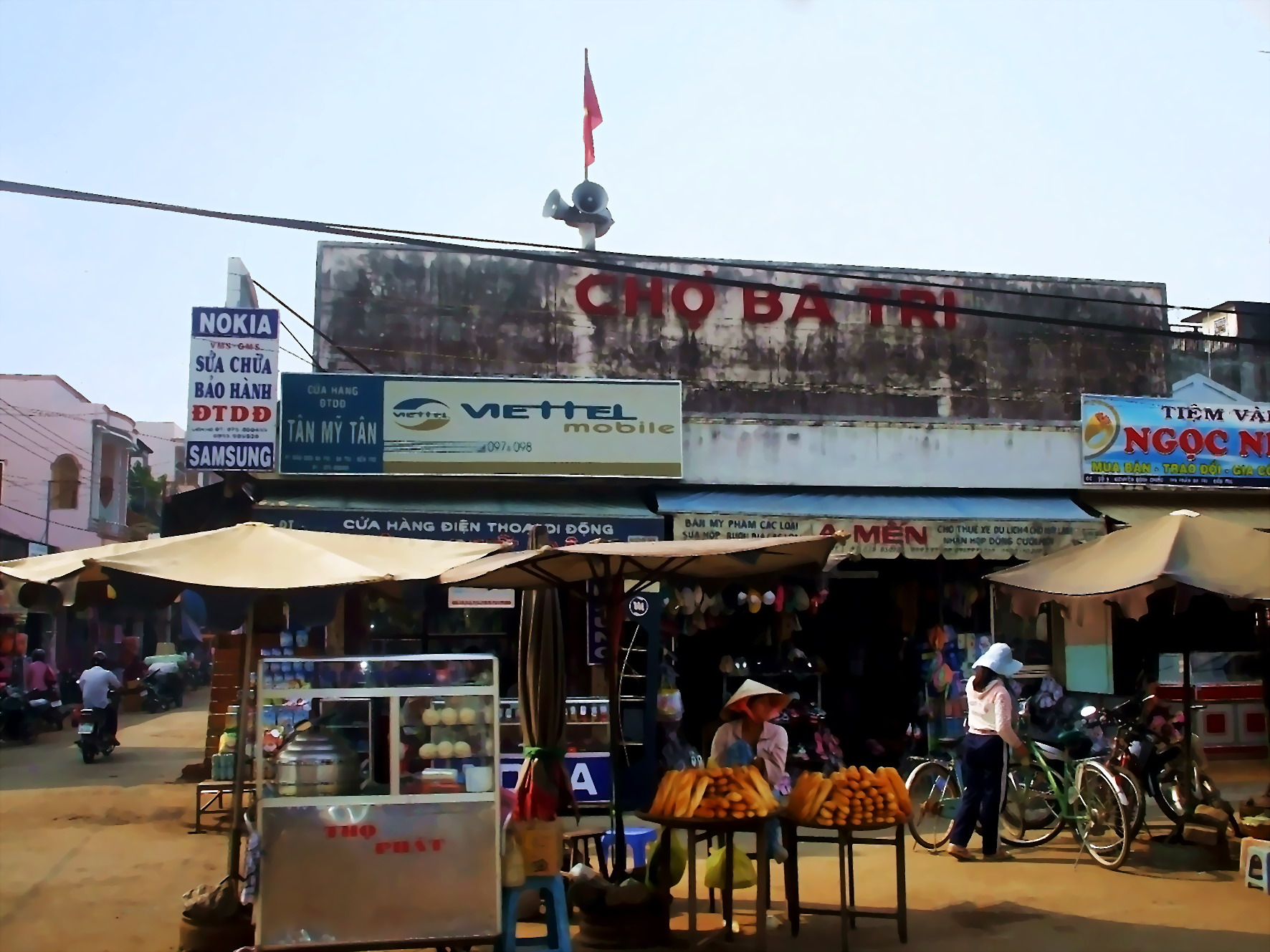 Chợ Ba Tri thuộc tỉnh Bến Tre, Việt Nam.